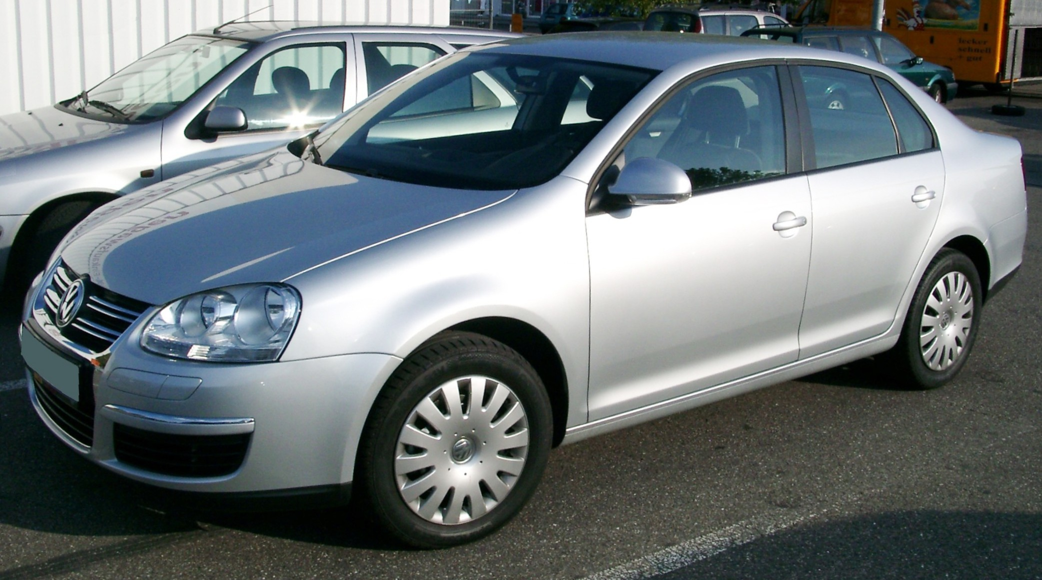 VW Jetta V